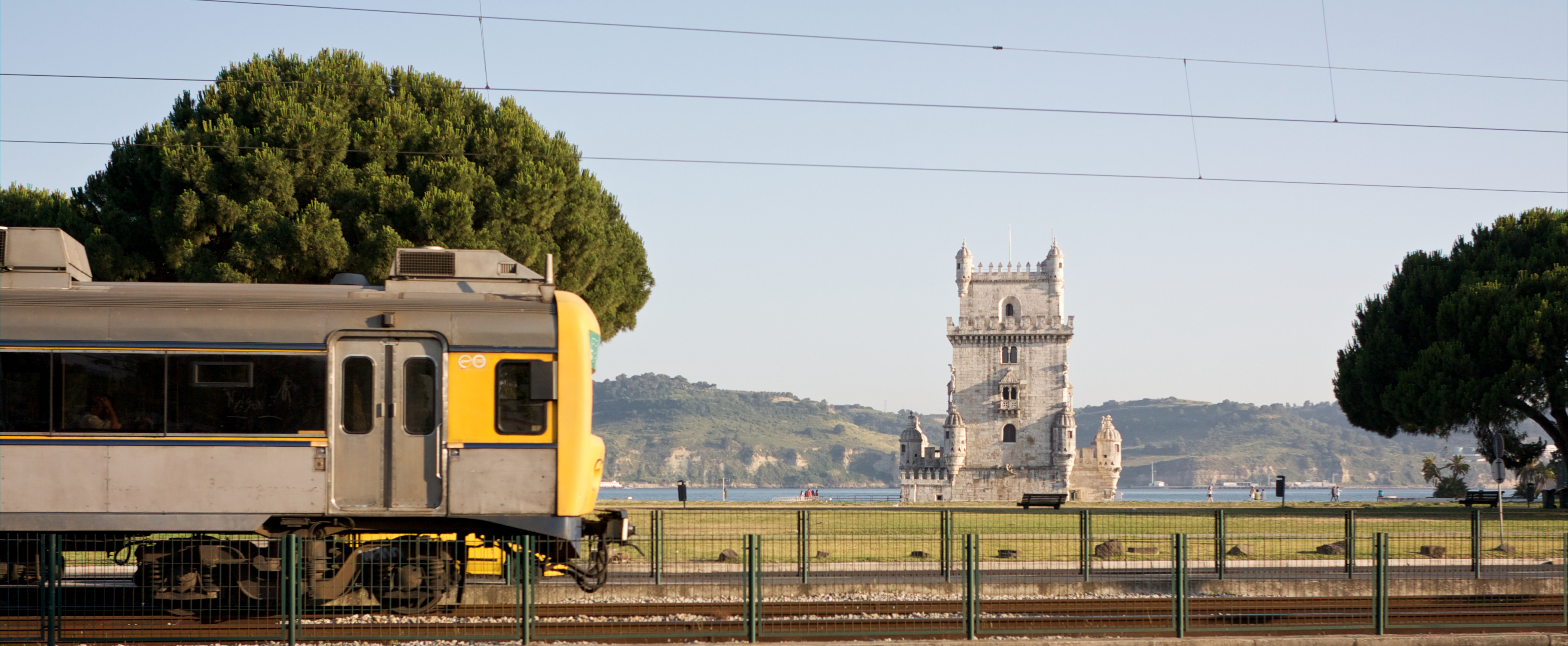 Tipo: Comboio Urbano 19439 [Cais do Sodré - Oeiras] Local: Belém [Linha de Cascais, PK 6] Data e hora: 30 de Junho de 2010 [19h37] Material: Automotoras 32xx e 31xx [Unidade Quádrupla Eléctrica + Unidade Tripla Eléctrica]